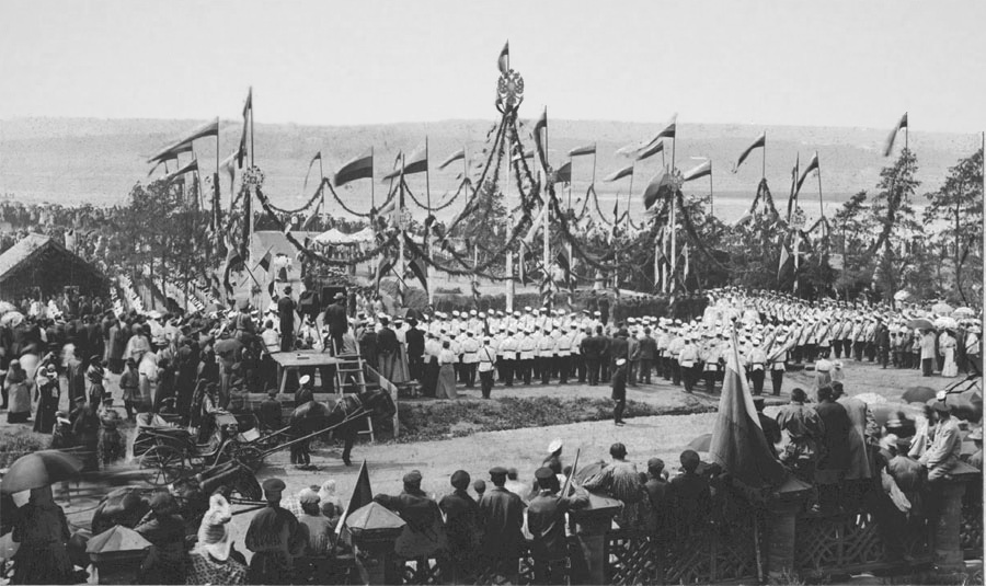 Иркутск. Закладка памятника императору Александру III на набережной Ангары 22 июня 1903. Фото О. Г.-Г. Адикса.